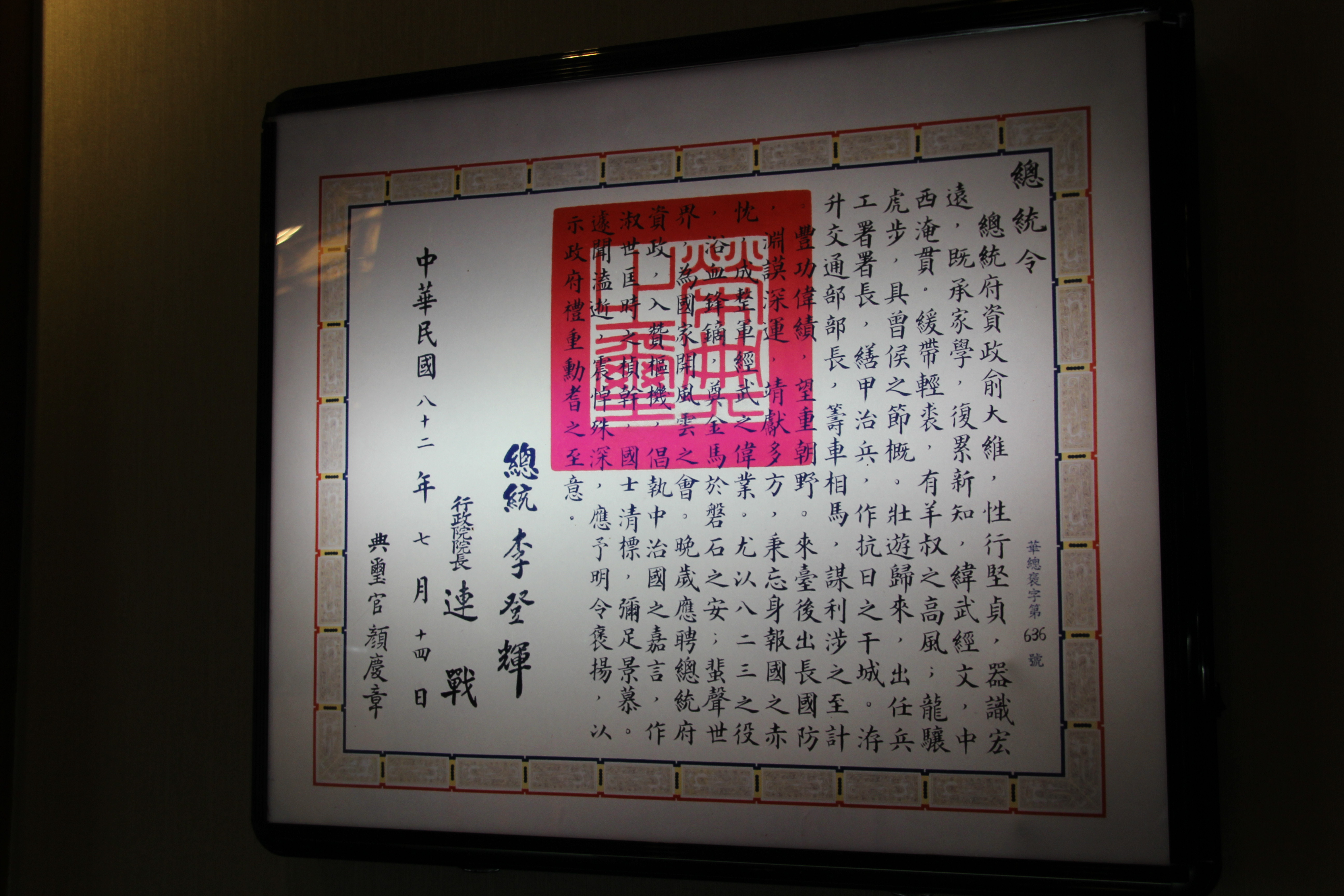 中文（台灣）: 俞大維先生紀念館展示1993年（中華民國82年）7月14日中華民國總統李登輝發布、行政院院長連戰副署的俞大維褒揚令，上方蓋印榮典之璽，左方蓋印總統李登輝、行政院院長連戰、典璽官顏慶章簽字章。